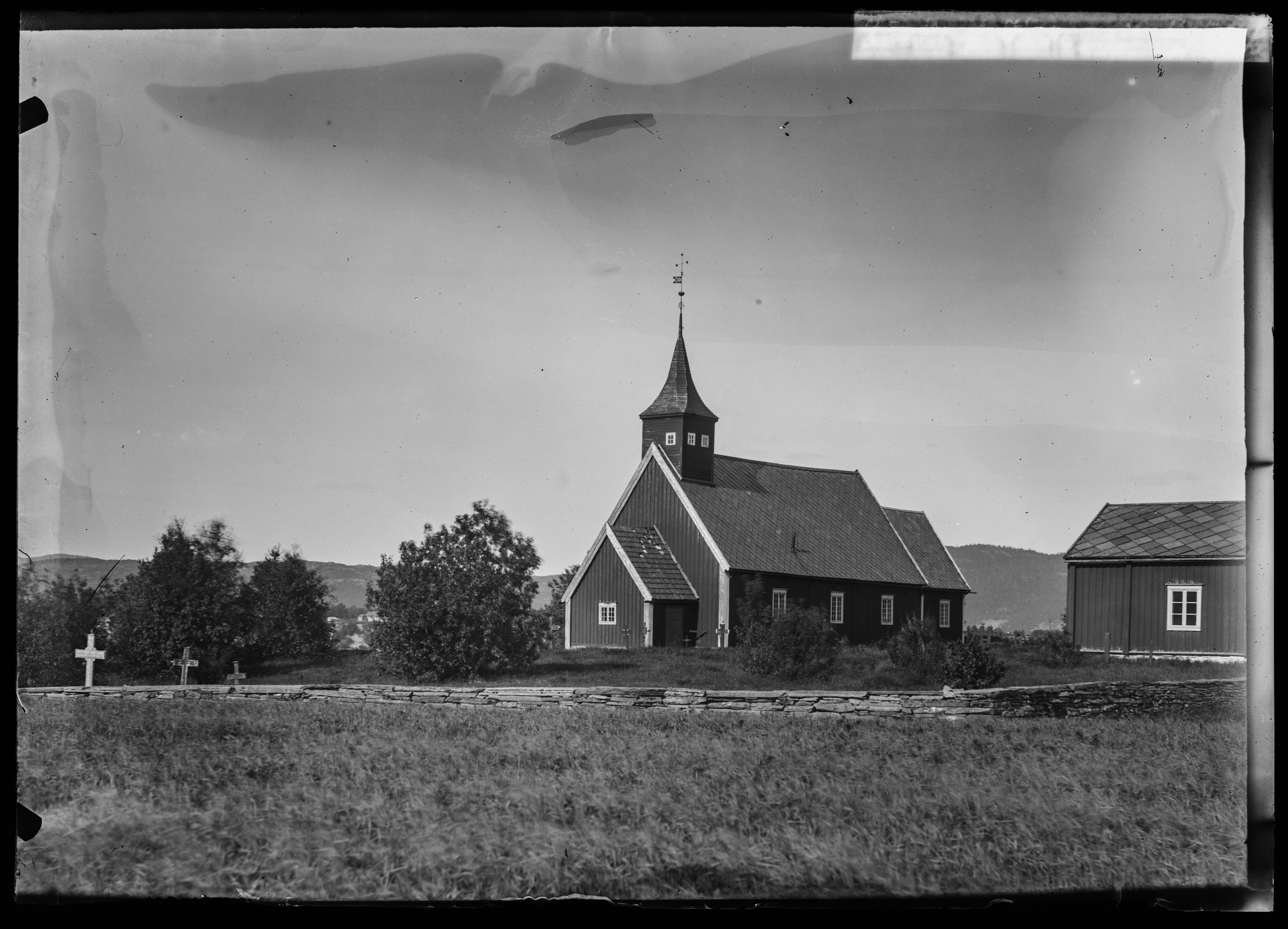 Eksteriør av Lånke gamle kirke i Stjørdal.